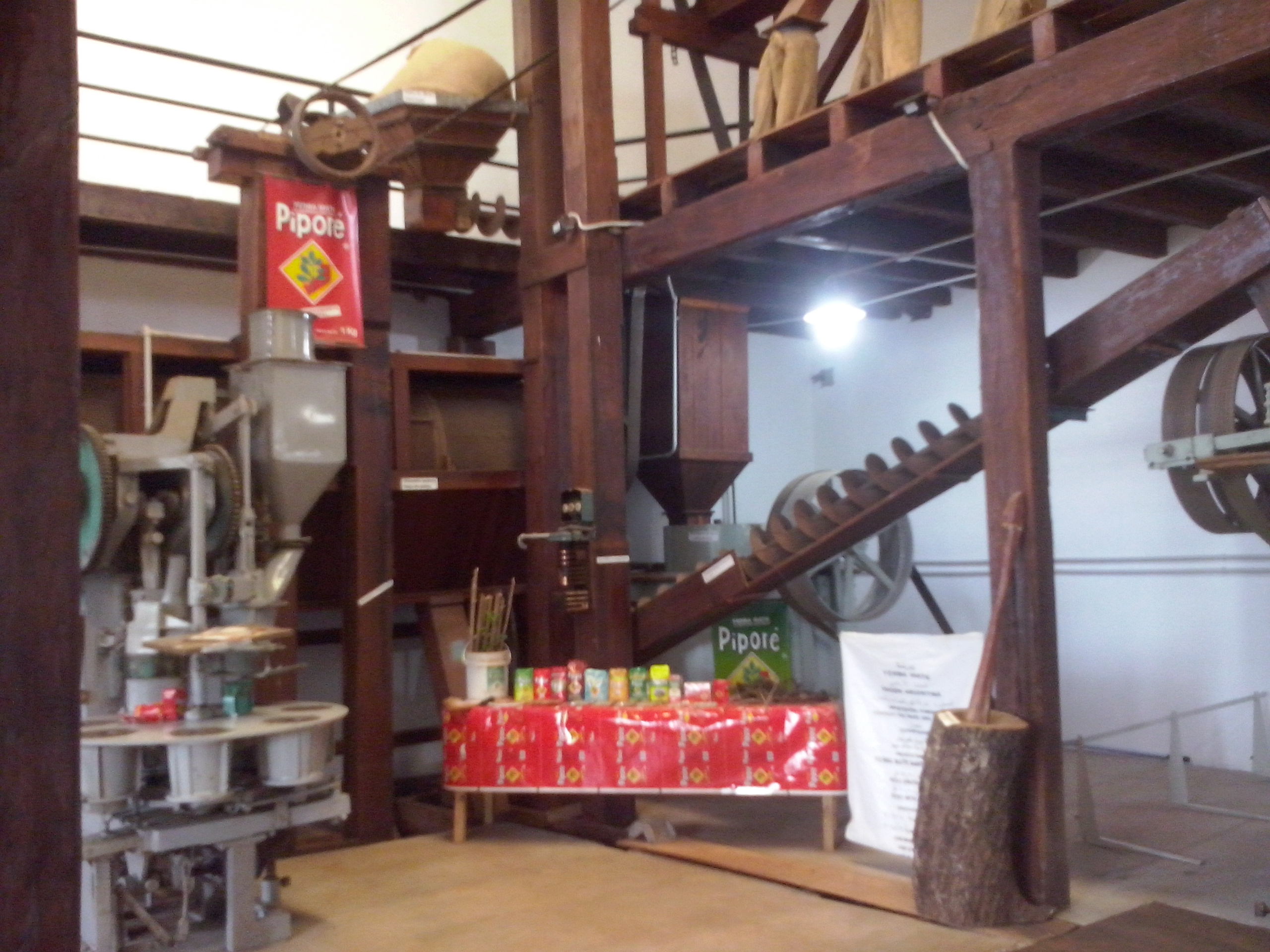 Piporé's museum